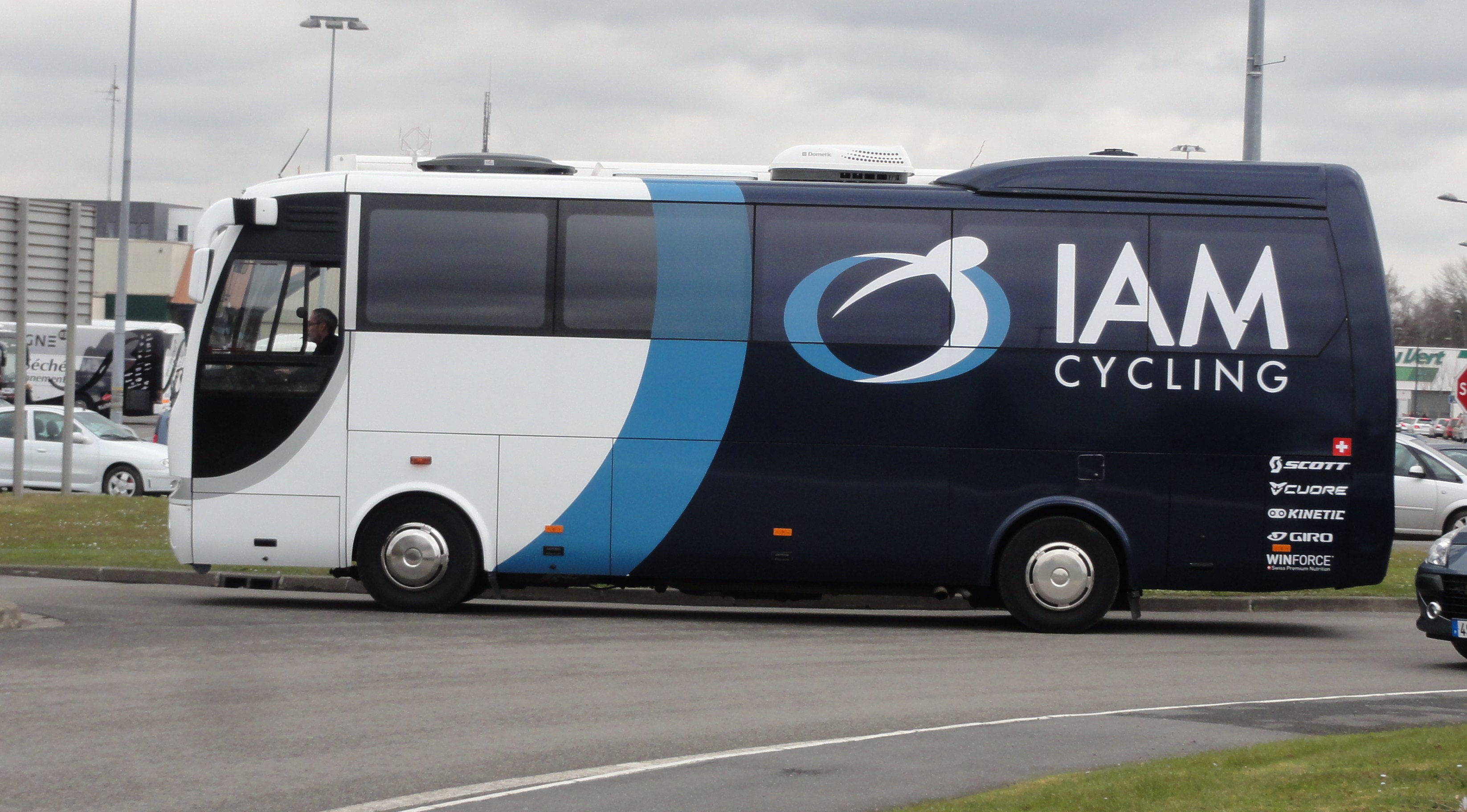 Reportage photographique réalisé le mardi 11 avril 2013 durant l'édition 2013 du Grand Prix de Denain à Denain, Nord, Nord-Pas-de-Calais, France.